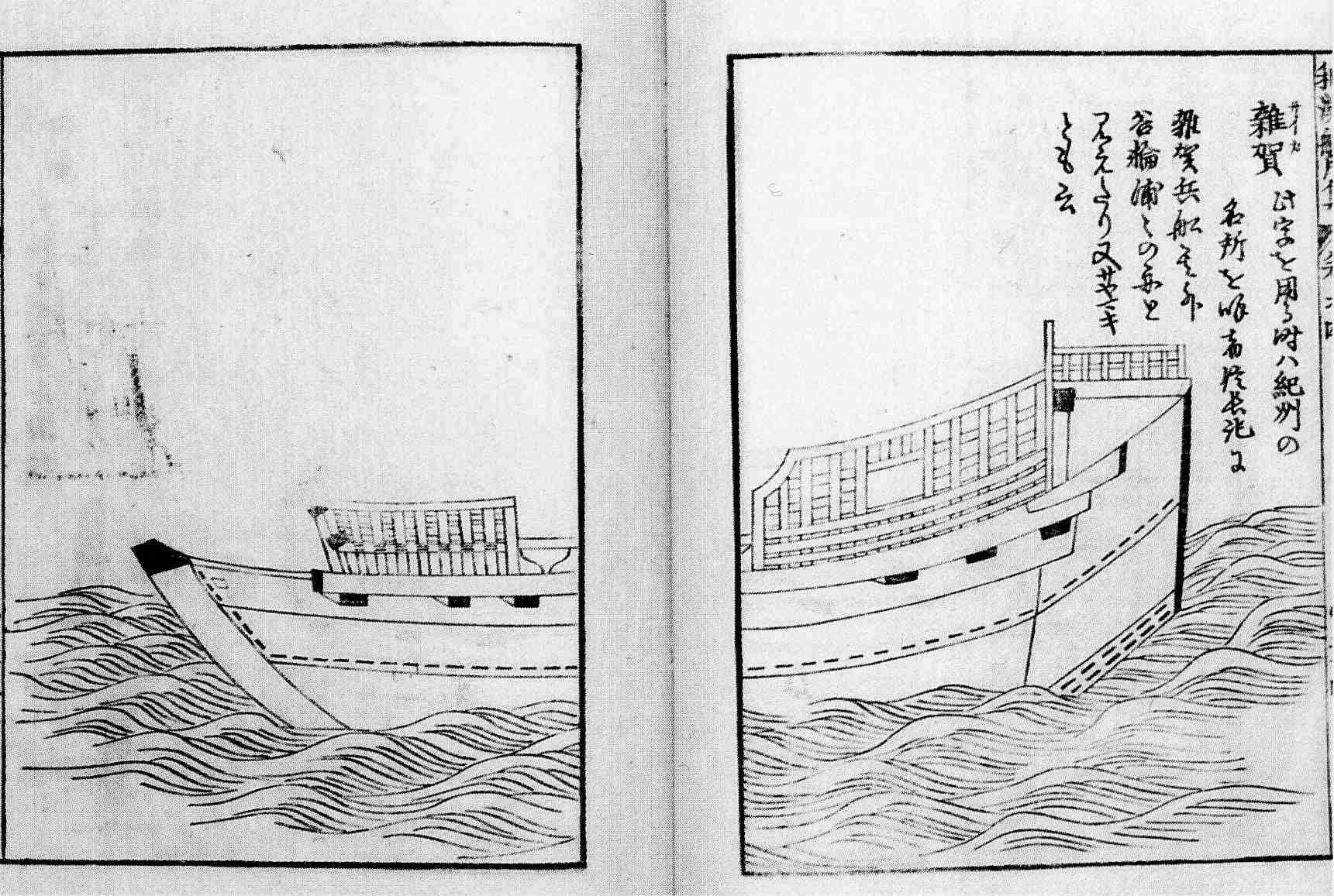 和漢船用集